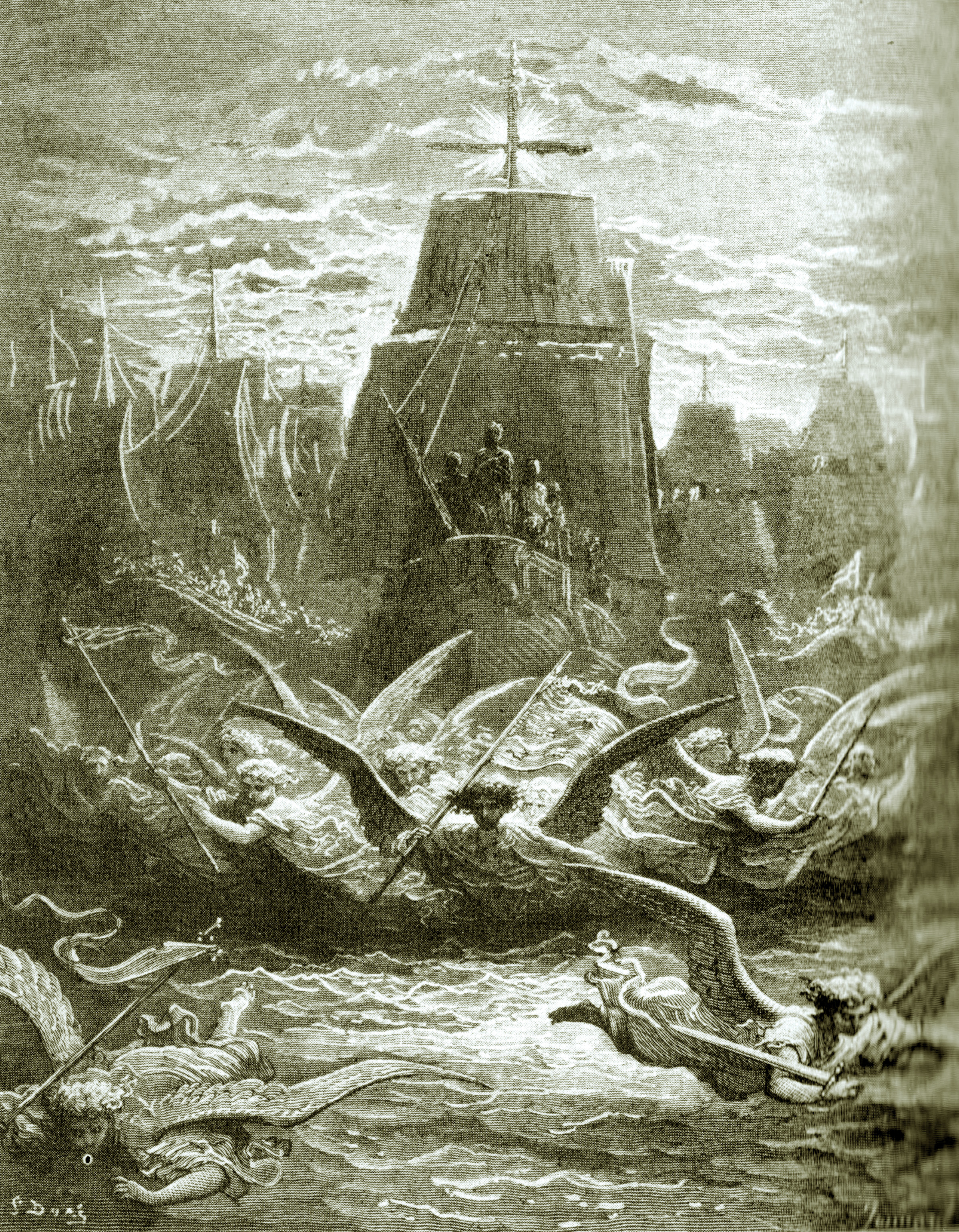 Gravure de Gustave Doré, représentant le départ d'Aigues-Mortes de Louis IX pour la croisade